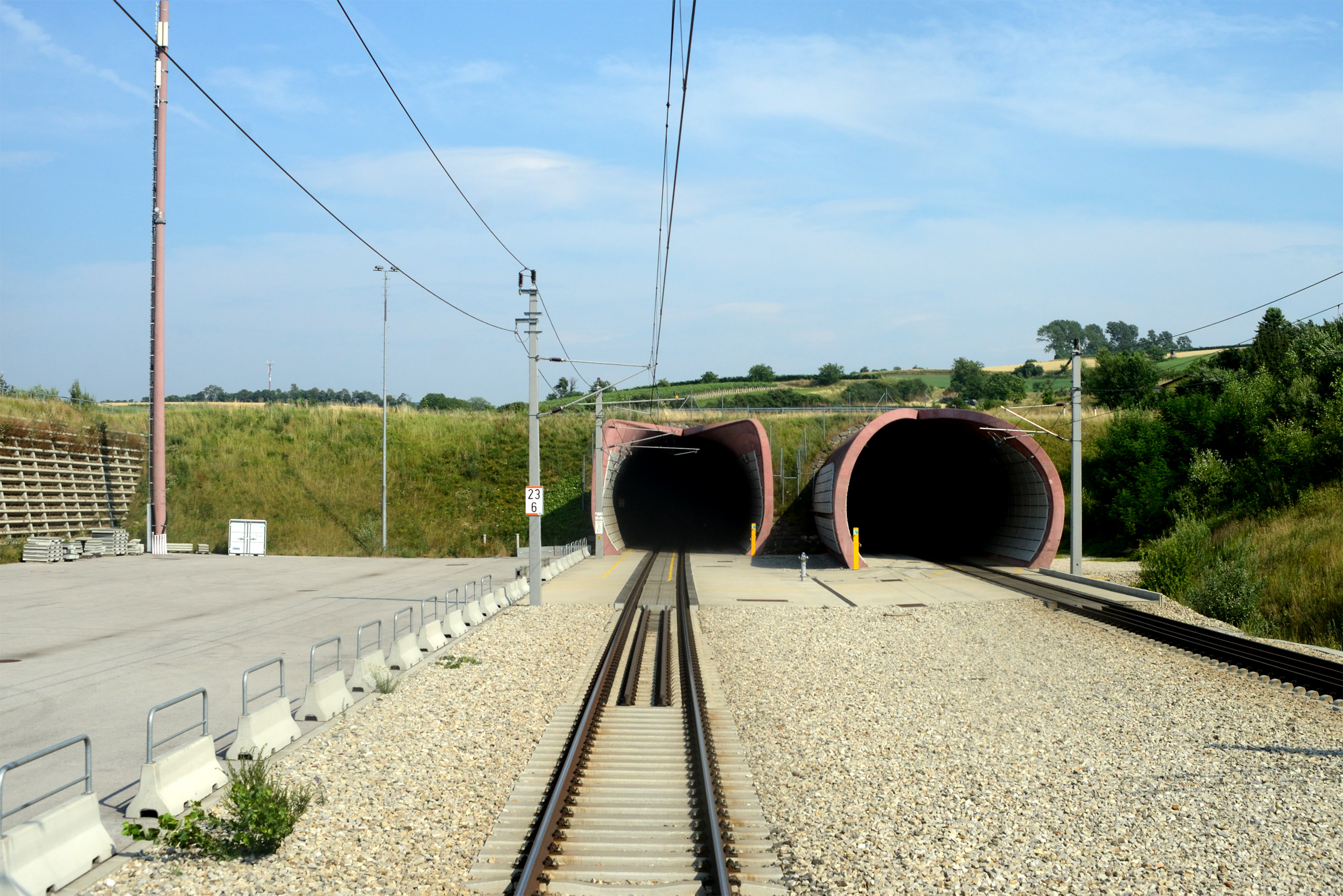 Westportal des Wienerwaldtunnels im Tullnerfeld.